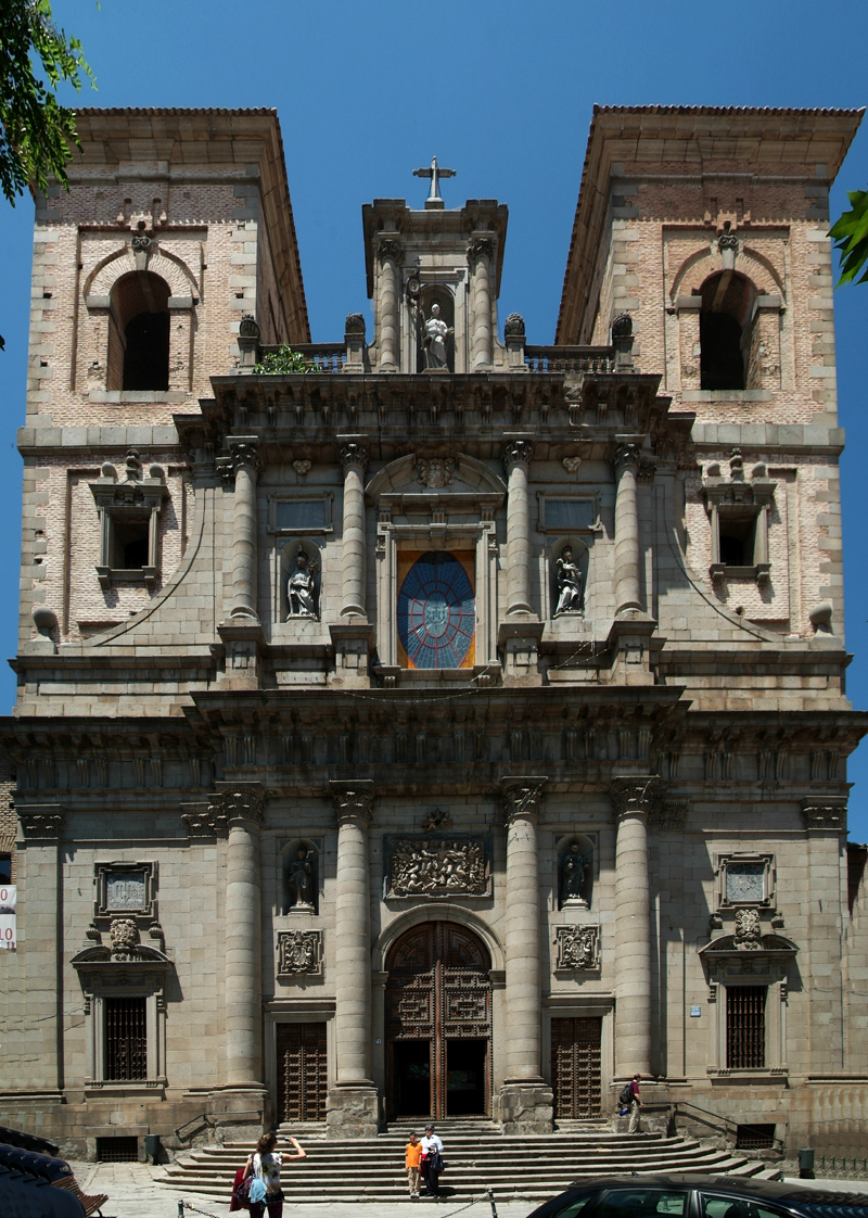 Iglesia de San Ildefonso